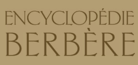 Logotype de l'Encyclopédie berbère